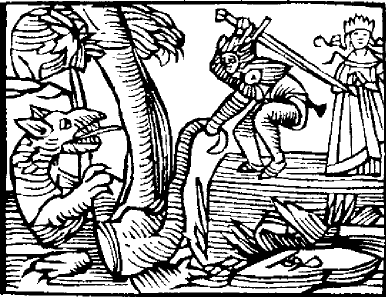 Hie hat der Seyfrid den Trachen zerhawen, vnd wirfft die stück hinab.